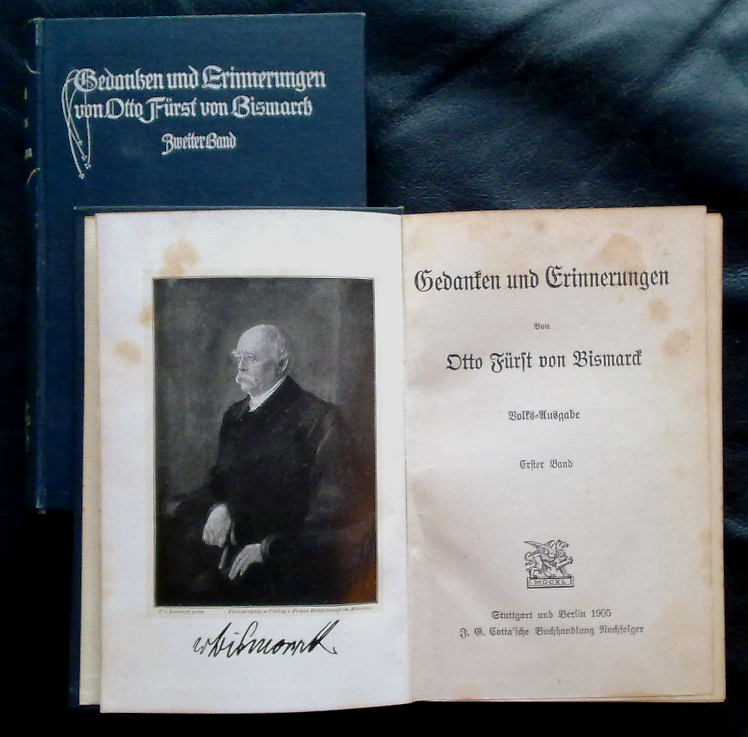 2bändige sog. "Volksausgabe" der Bismarck'schen Erinnerungen, 1905